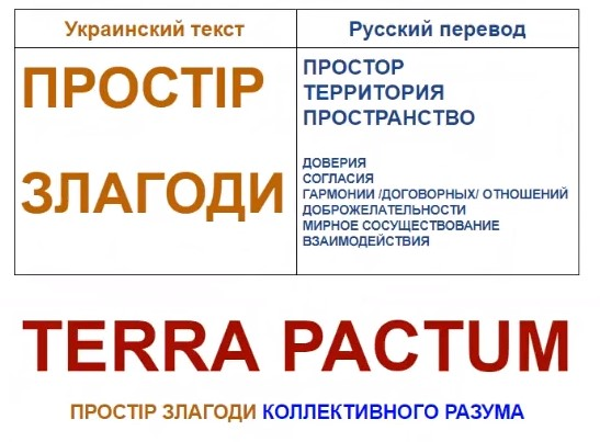 Переклад назви "Простір злагоди"